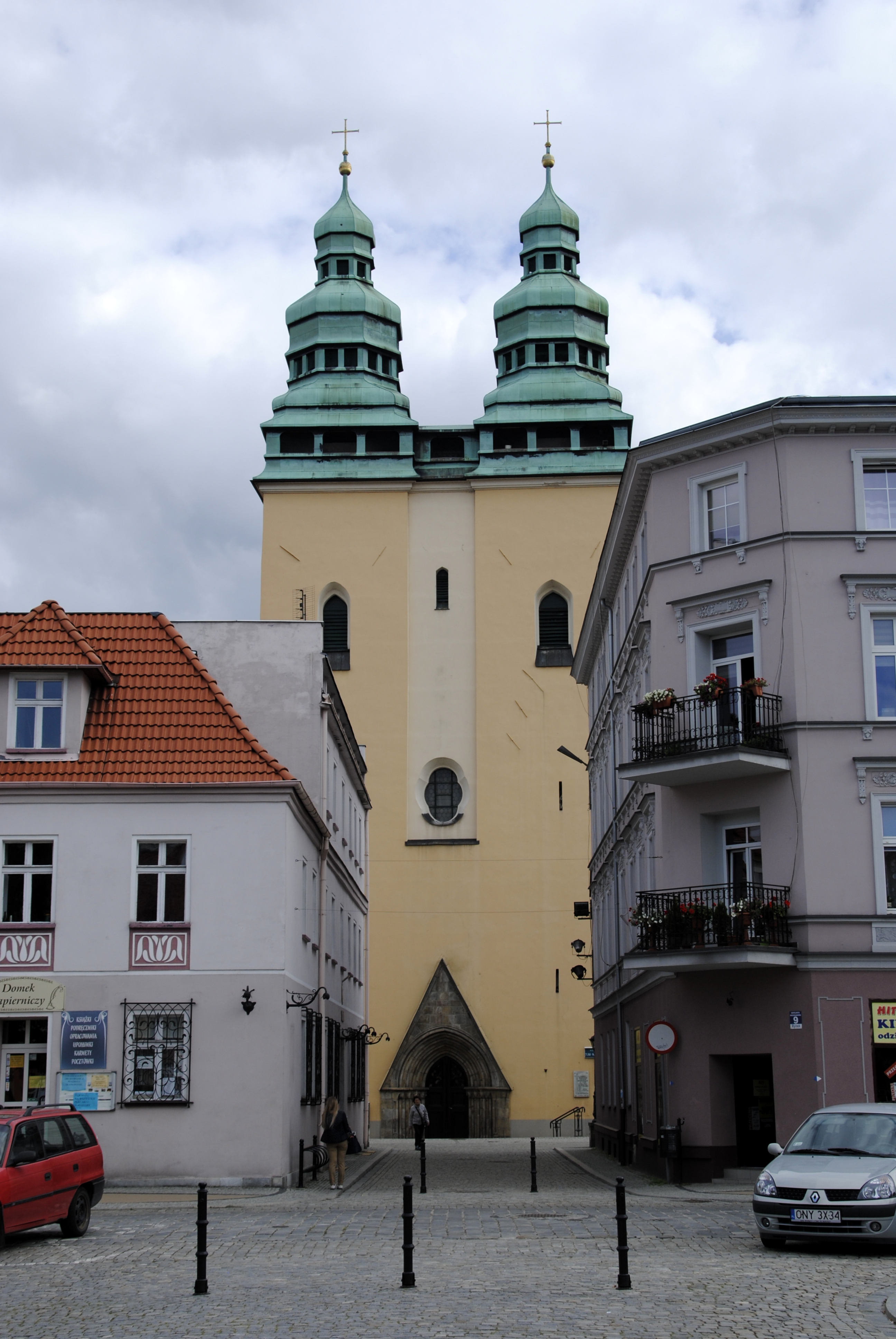 St. Laurentius in Bad Ziegenhals (Oberschlesien)